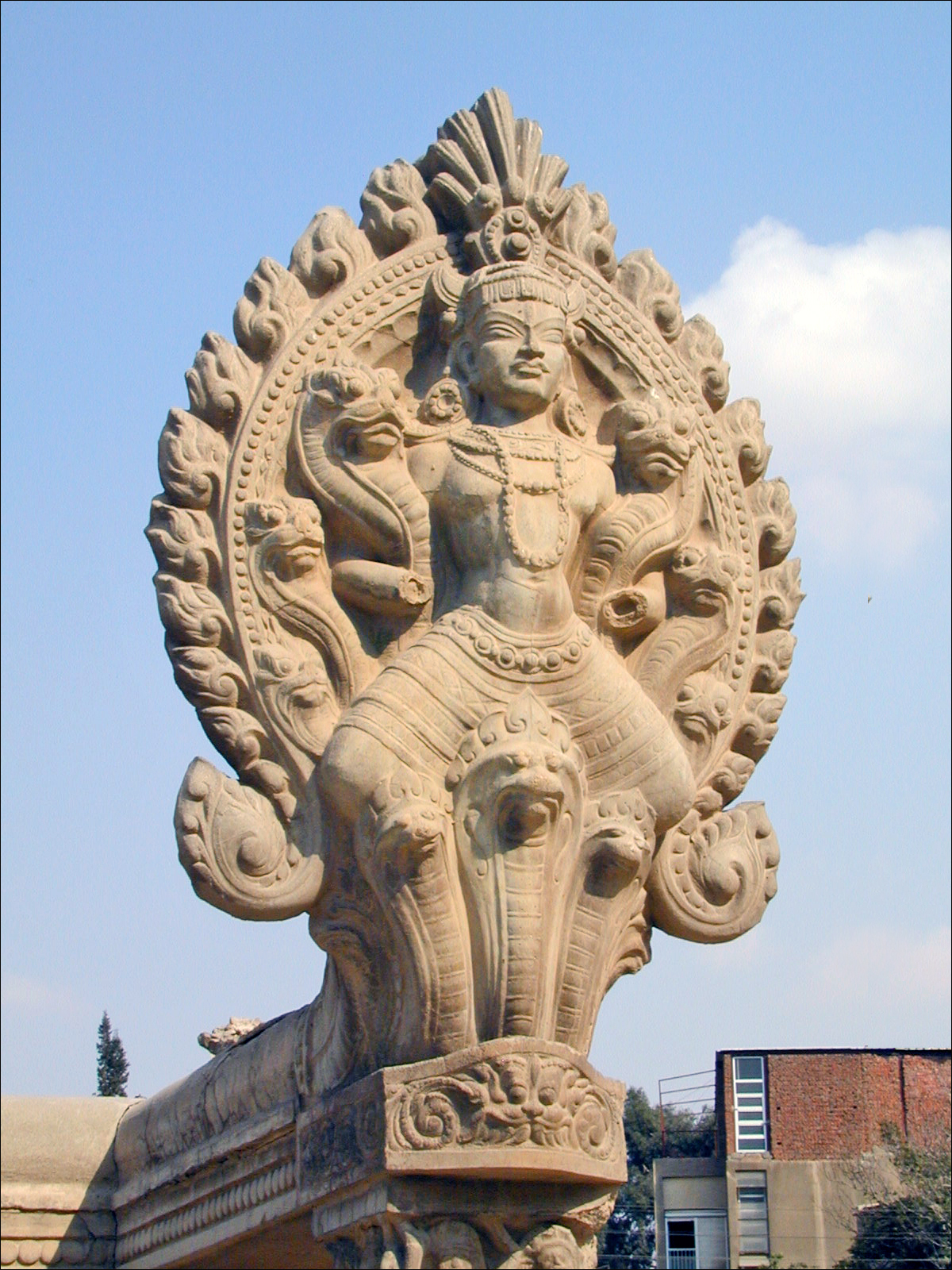 Balustrade avec Shiva sur un Naga Héliopolis, le nouveau Caire, doit beaucoup à son promoteur le baron Empain. C'est un ensemble urbain cohérent inspiré des cités-jardins, qui comprend de nombreux immeubles aux architectures intéressantes. La villa hindoue est un immeuble inspiré des temples indiens qui a servi de résidence au baron Empain lors de ses séjours à Héliopolis.Conçue et réalisée en béton entre 1908 et 1911 par l'architecte français Alexandre Marcel, la villa fut vendue en 1955 à une famille saoudienne. En 2002, le propriétaire saoudien voulait en faire un casino mais l'opération n'avait pas commencé. Elle n'était pas visitable et était très peu entretenue. Site de l'auteur réalisé sur l'Egypte en 2002 Article de Wikipedia sur Heliopolis Le parc oriental (Alexandre Marcel)